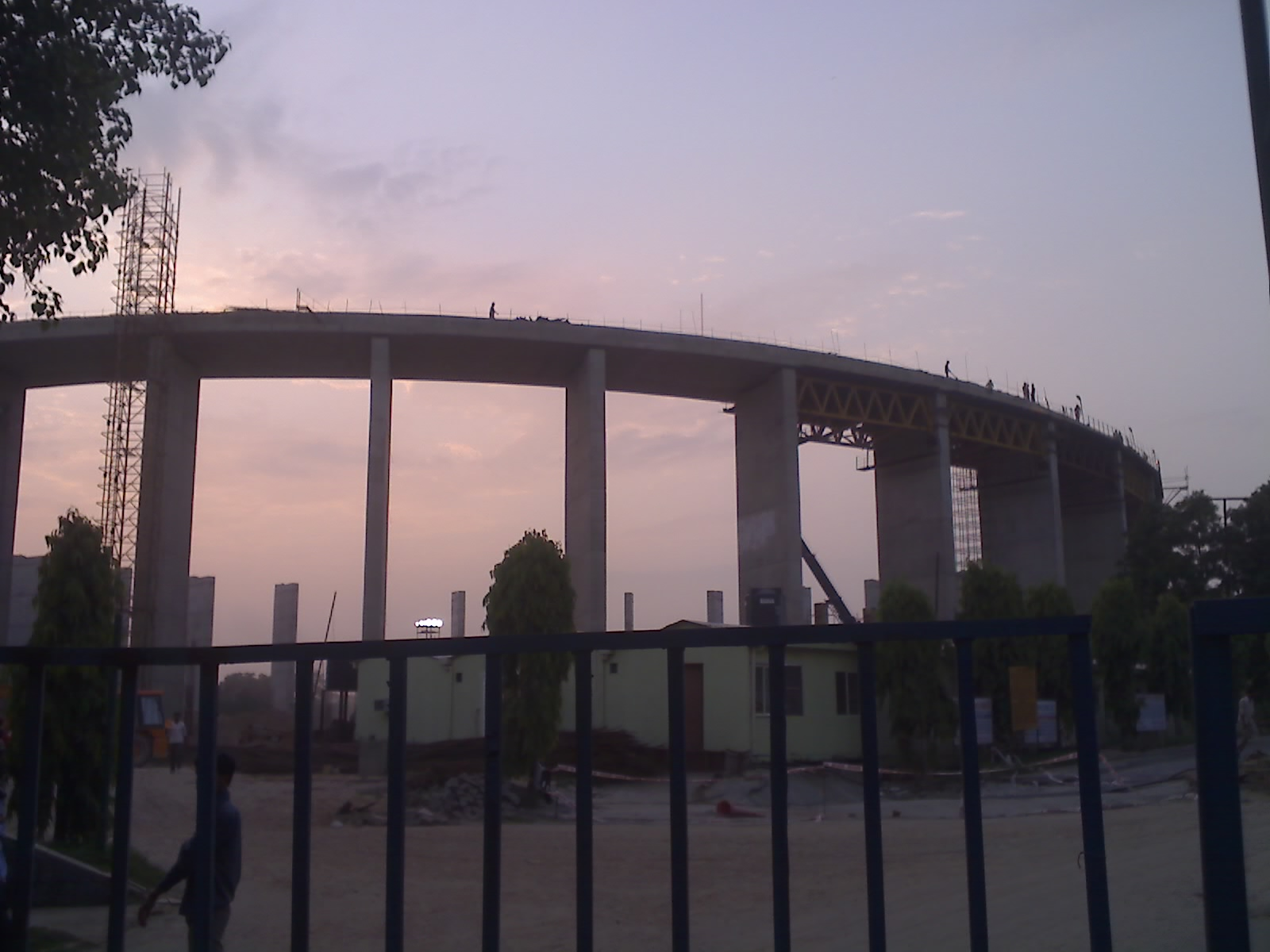 तालकटोरा स्टेडियम